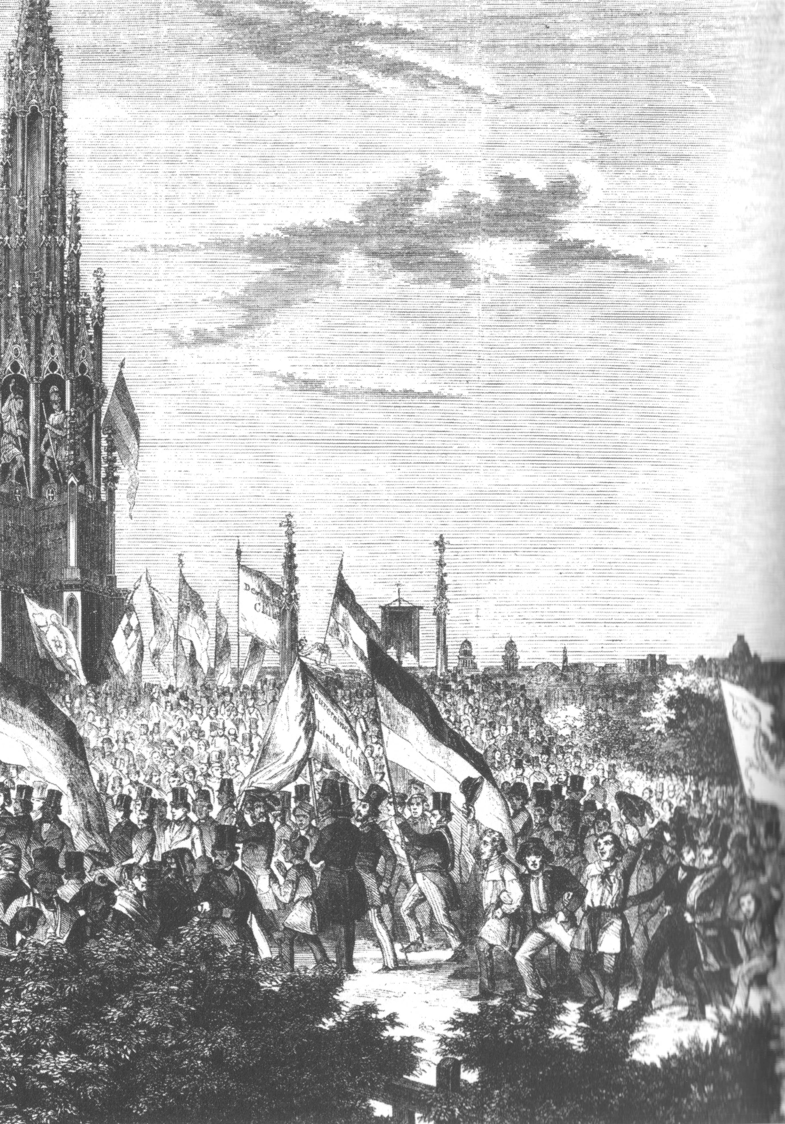 Illustrirte Zeitung, Leipzig, Nr. 270, 2. September 1848, 149. Festzug Berliner Vereine zum Kreuzberg am 6. August 1848.